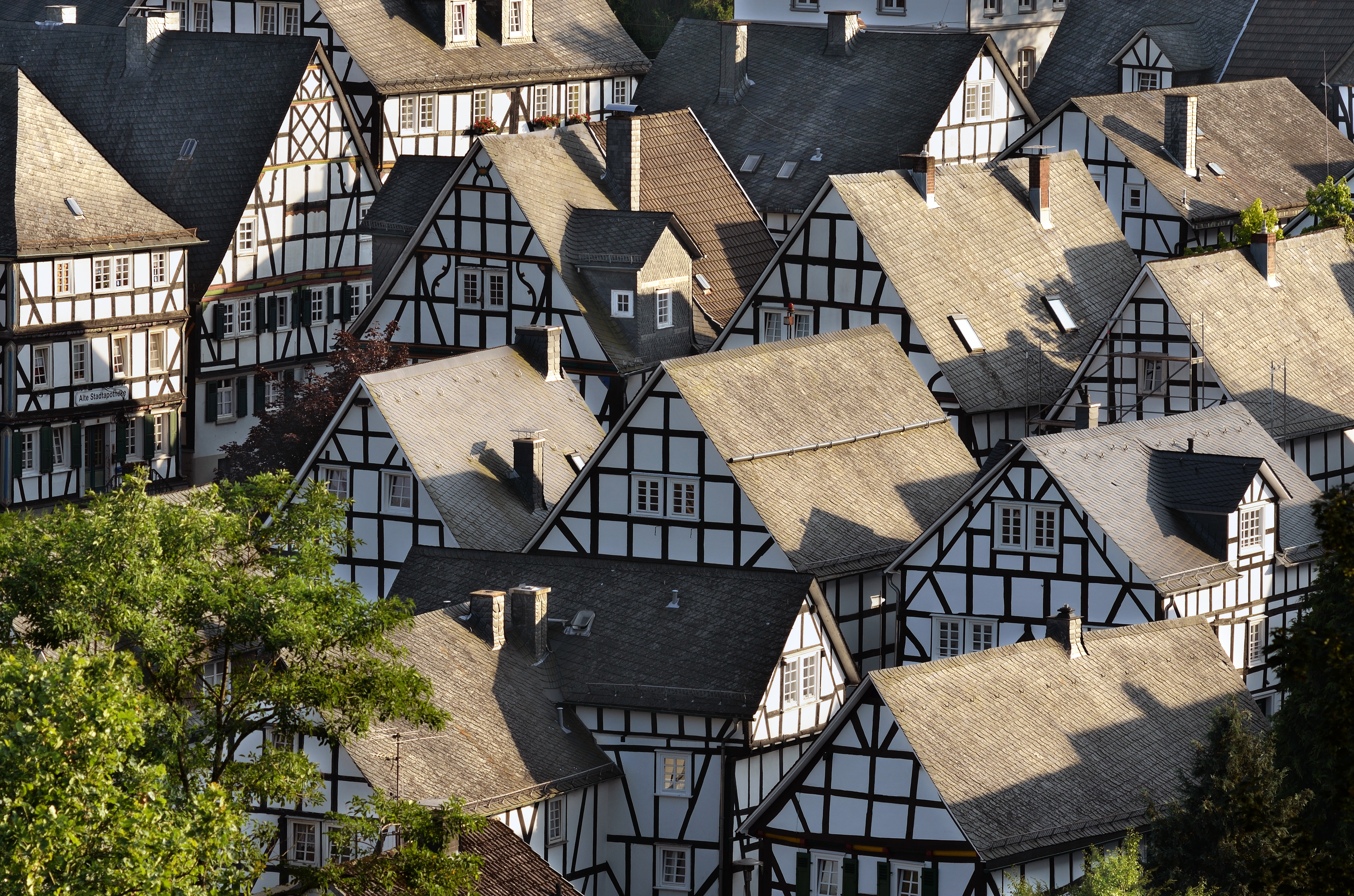 57258 Freudenberg, Germany